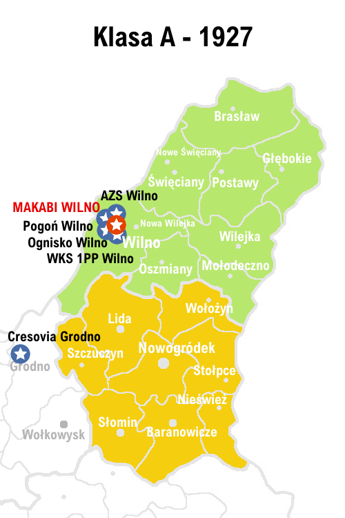 Rozgrywki w piłce nożnej w Wileńskim OZPN w 1927 roku